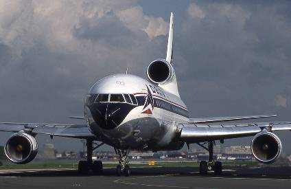 Avion Lockeed L-1011 visto desde un angulo frontal, propiedad de la aerolinea Delta Airlines durante un rodaje.